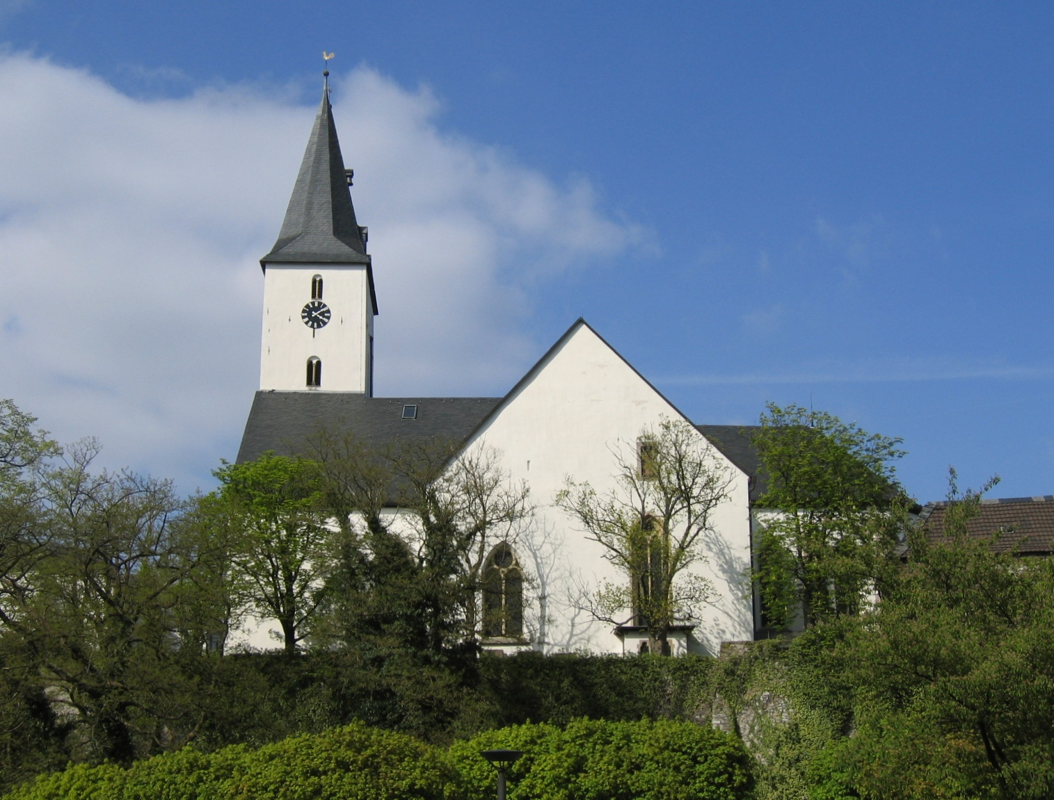 Oberste Stadtkirche (evangelisch) in Iserlohn.